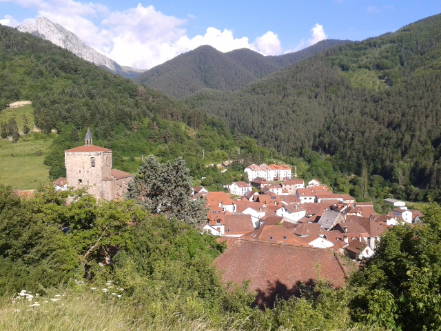 Vista de Isaba.